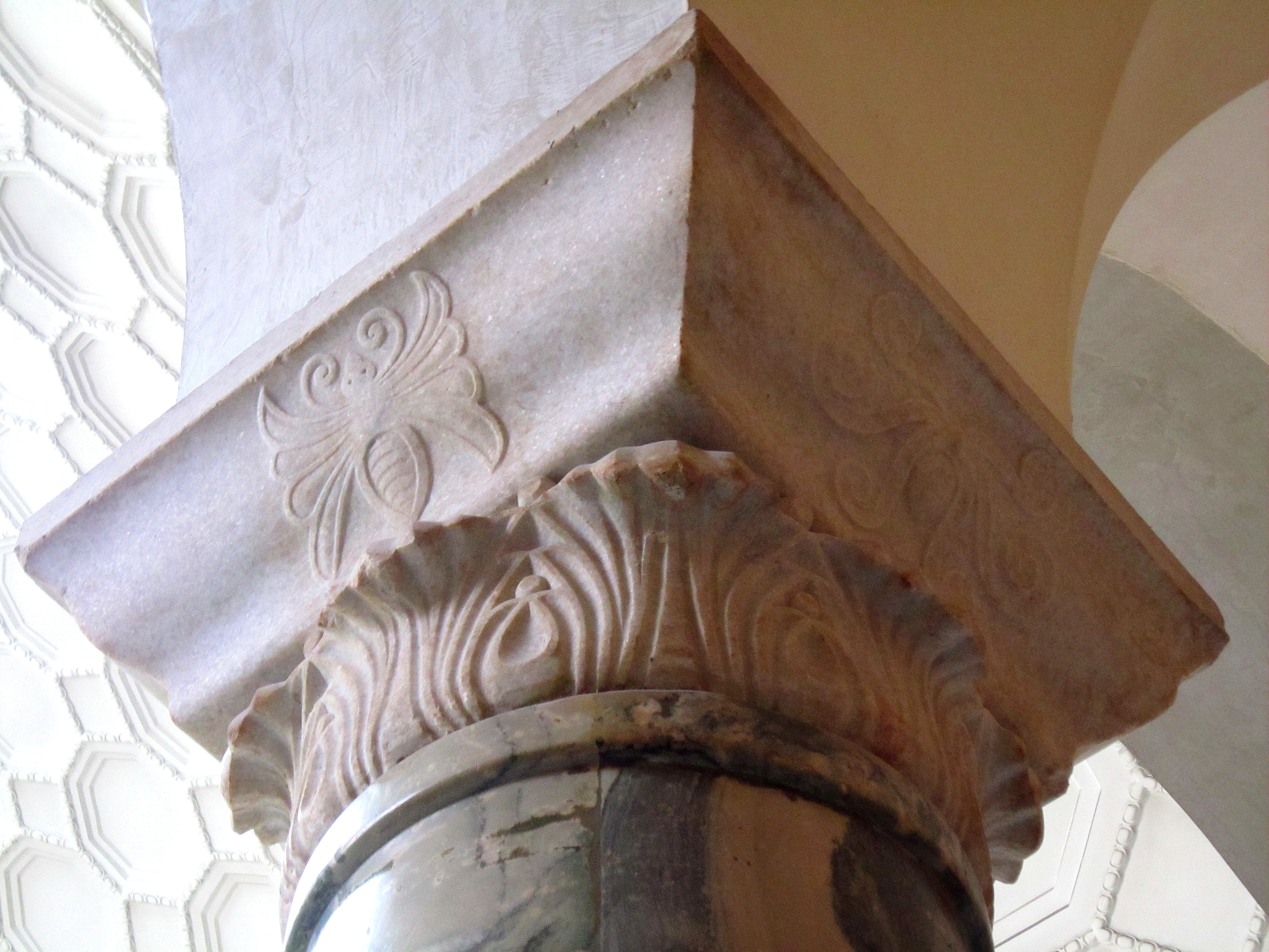 Detail Kapitell Galerie LMU Lichthof 1. OG